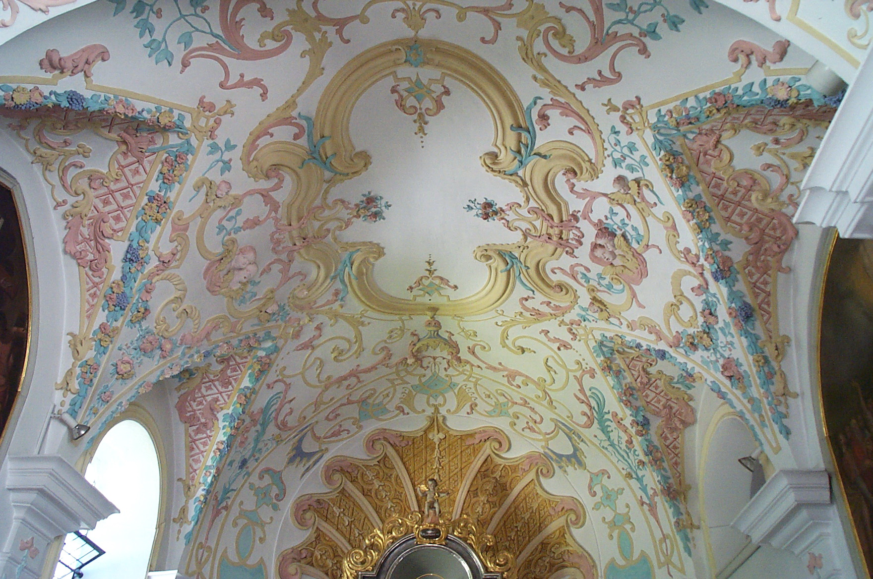 Herrngiesdorf, Bernhardstraße 23-25. Katholische Kirche St. Martin. Saalkirche mit Satteldach und eingezogenem, fünfseitig geschlossenem Chor. Tonnengewölbe mit Stichkappen und Stuckaturen aus dem Frührokoko um 1740 mit Laub- und Bandwerk, Blumengewinde Muscheln und Putten.